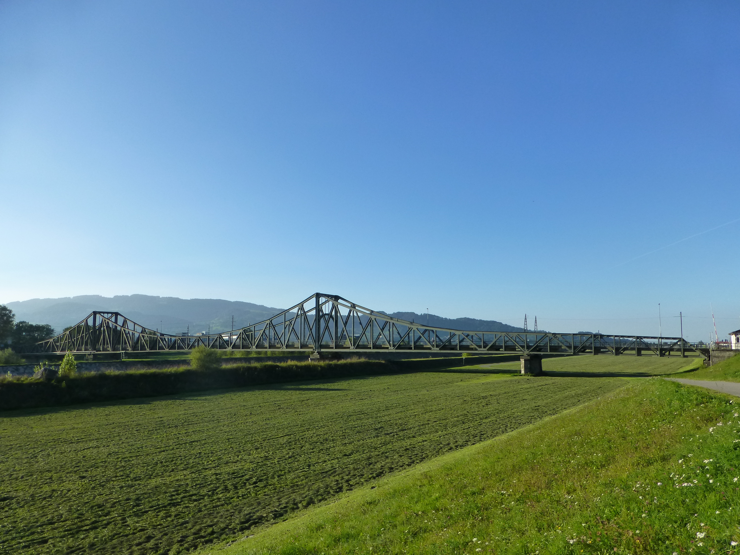 Wiesenrainbrücke zwischen Lustenau und Widnau, von Süden gesehen.